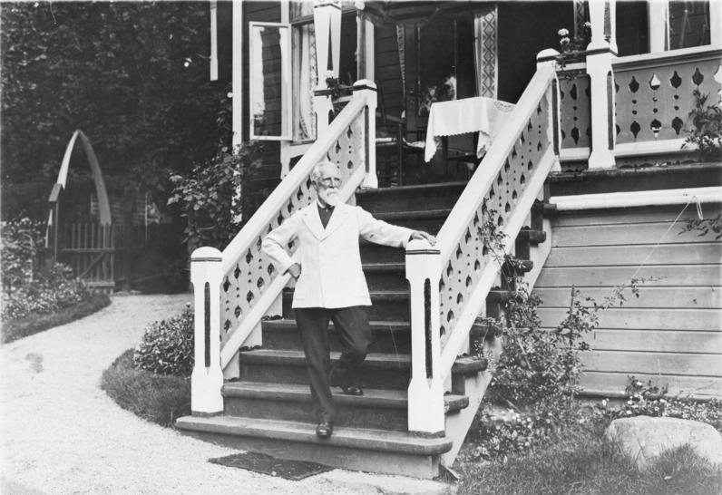 Polarfahrt mit dem Dampfer "München".- Professor Dahl vor seiner Villa in Balholmen; Aufenthalt S.M. des Deutschen Kaisers kurz vor dem Krieg 17. Juli - 12. August 1925